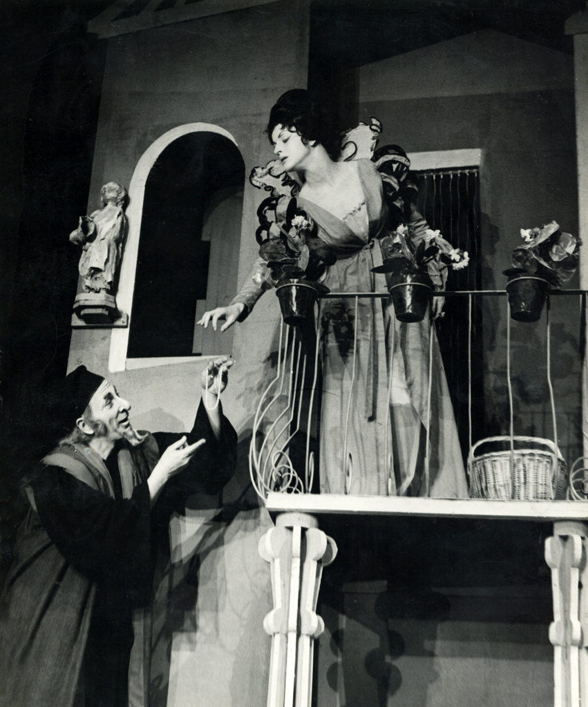 Marin Držić, Dundo Maroje, SNG v Mariboru. Na fotografiji: Jože Samec (Žid Sadi), Milena Muhič (Laura-Mandaljena).